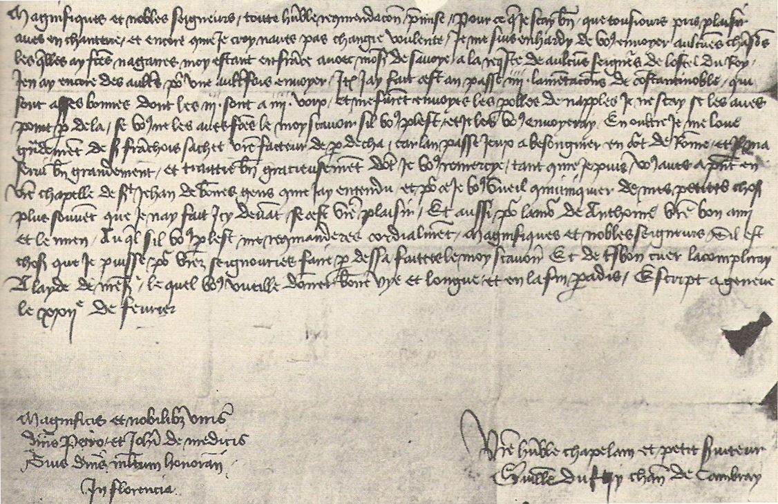 Brief von Guillaume Dufay aus Genf an die Brüder Piero und Giovanni de' Medici; Dufays eigenhändiges Autograph vom 22. Februar 1454 0der 1456